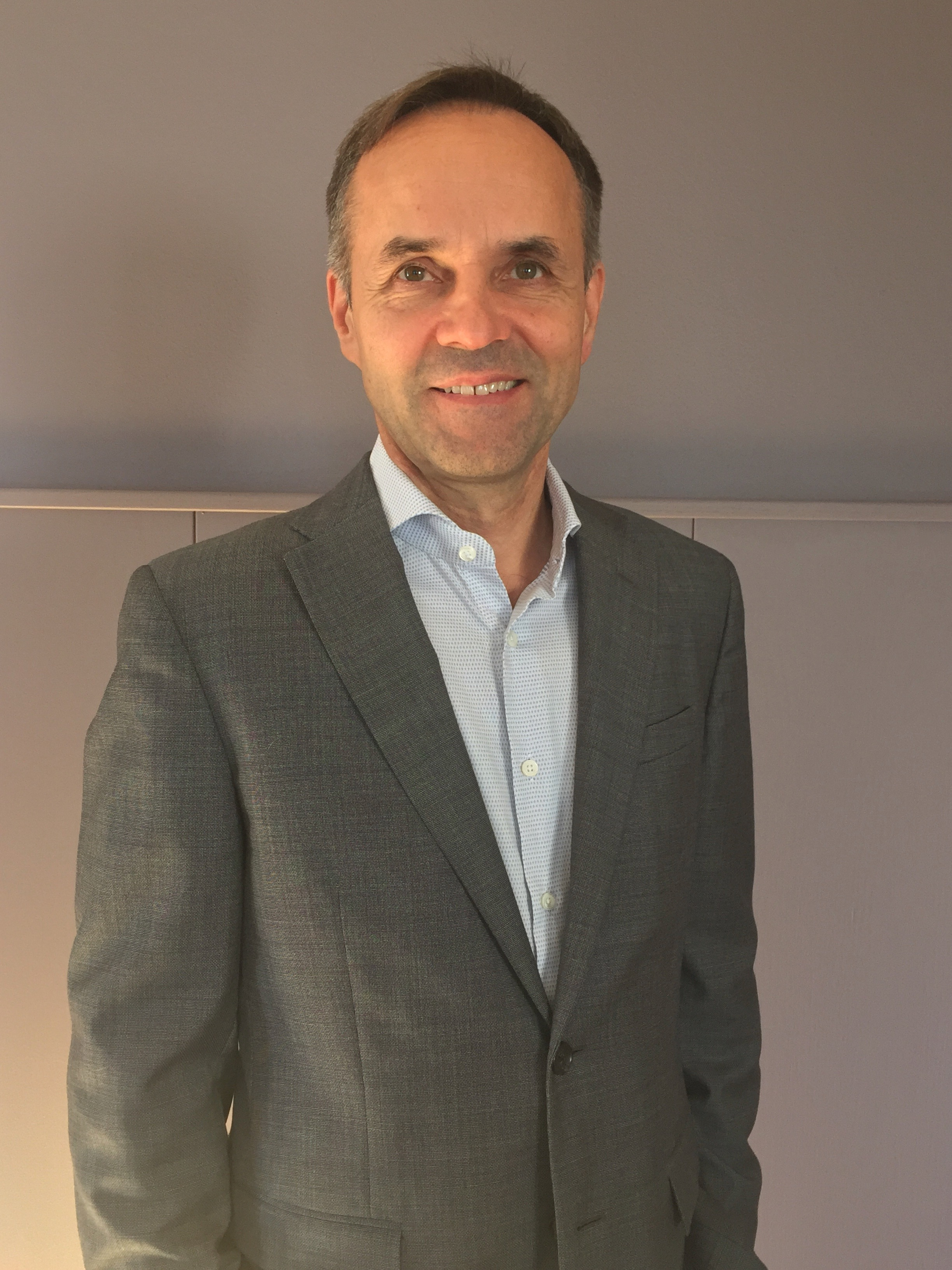 Ilpo Kuokkanen, toimitusjohtaja, Coolbrook Oy